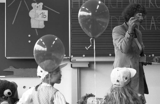 Erster Schultag